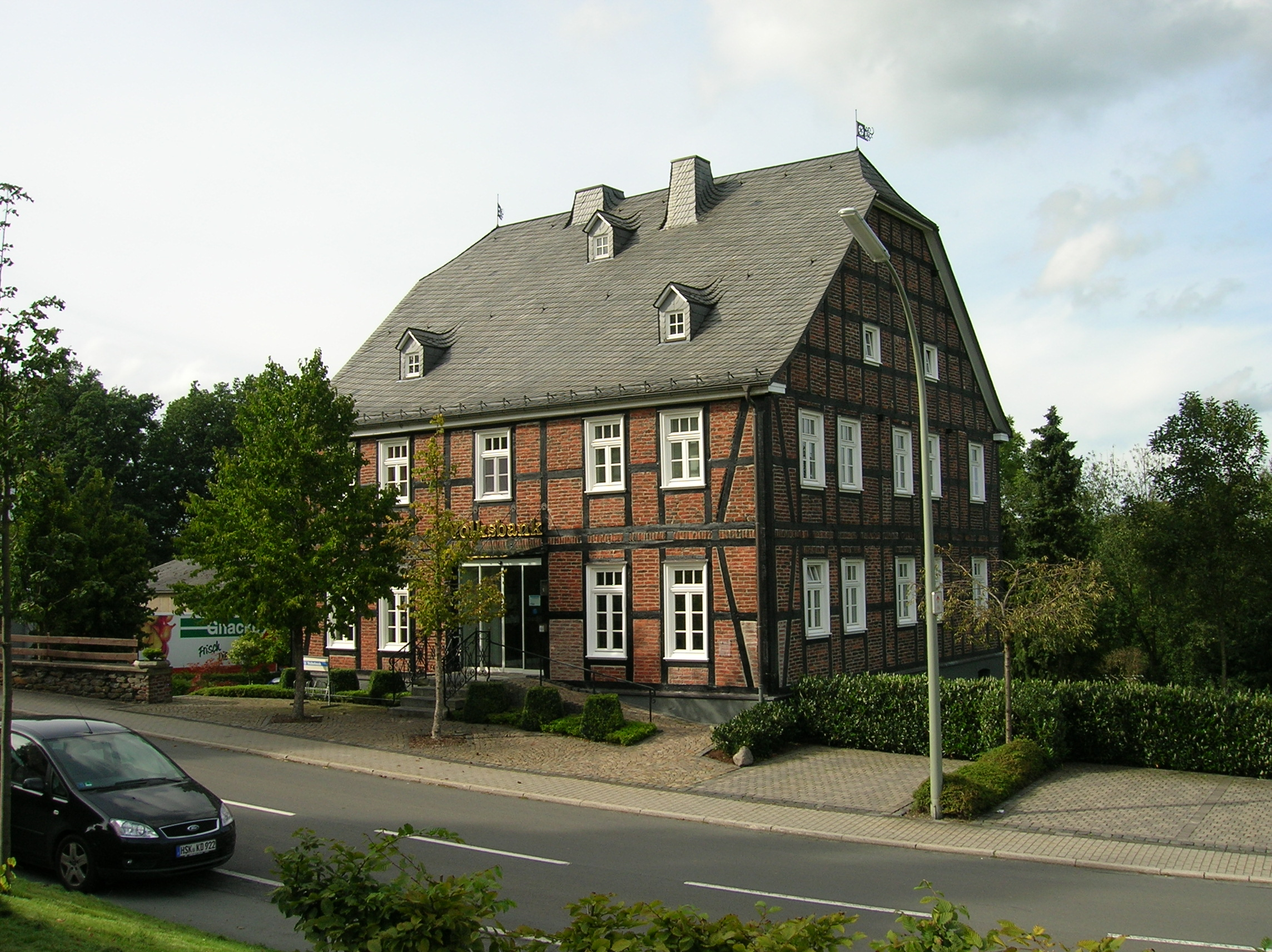 „Bürgerhaus“ in Schmallenberg-Wormbach, heute Wohnhaus und Geschäftsstelle der Volksbank